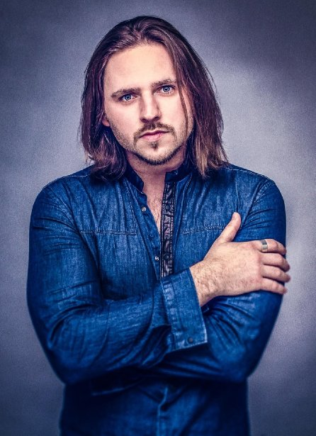 2014-ben Géczy Dávid rendezőről készült portré ’A győztes’ című film forgatása közben